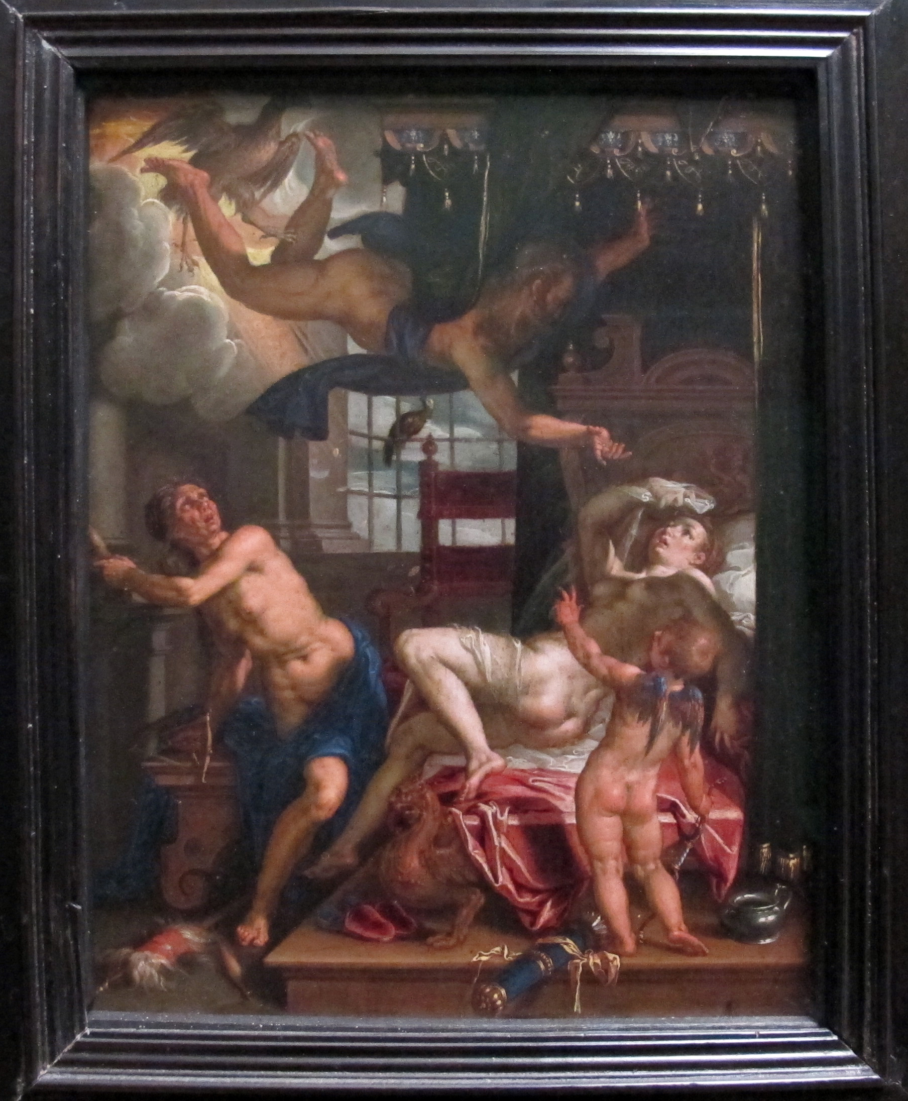 Pittura fiamminga al Louvre, Parigi